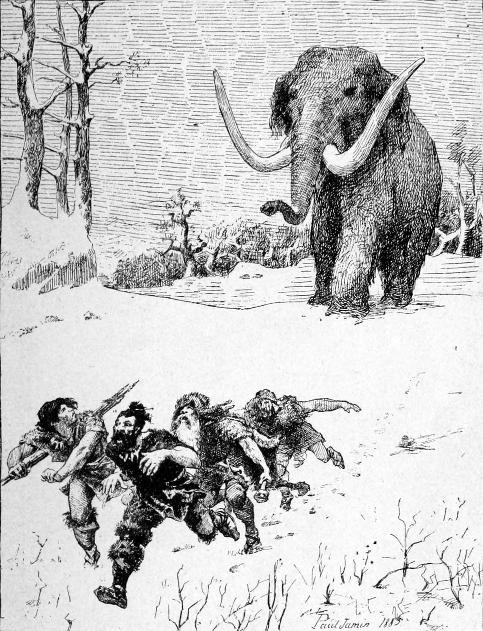 Le Mammouth